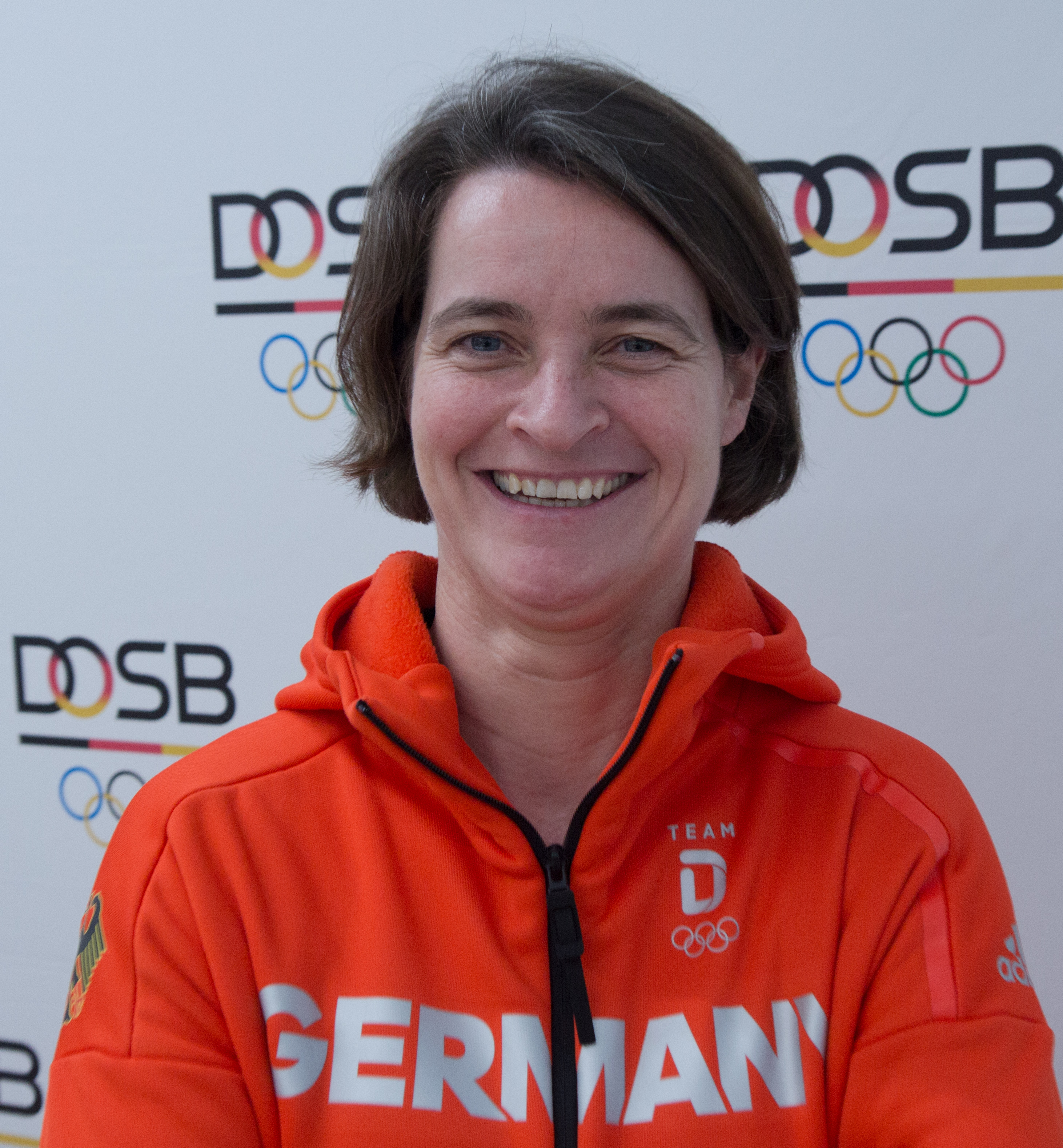 DOSB Vorstand Veronika Rücker